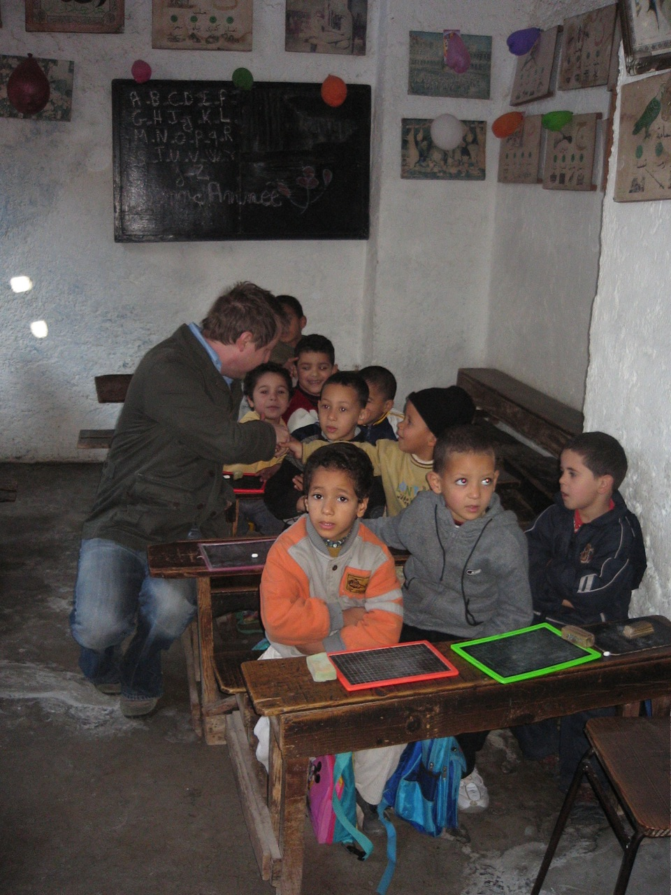 Classroom in Fez